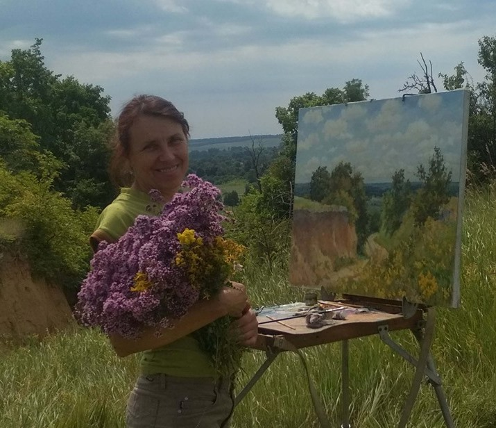 Надія Полуян-Внукова сфотографована мною під час пленеру